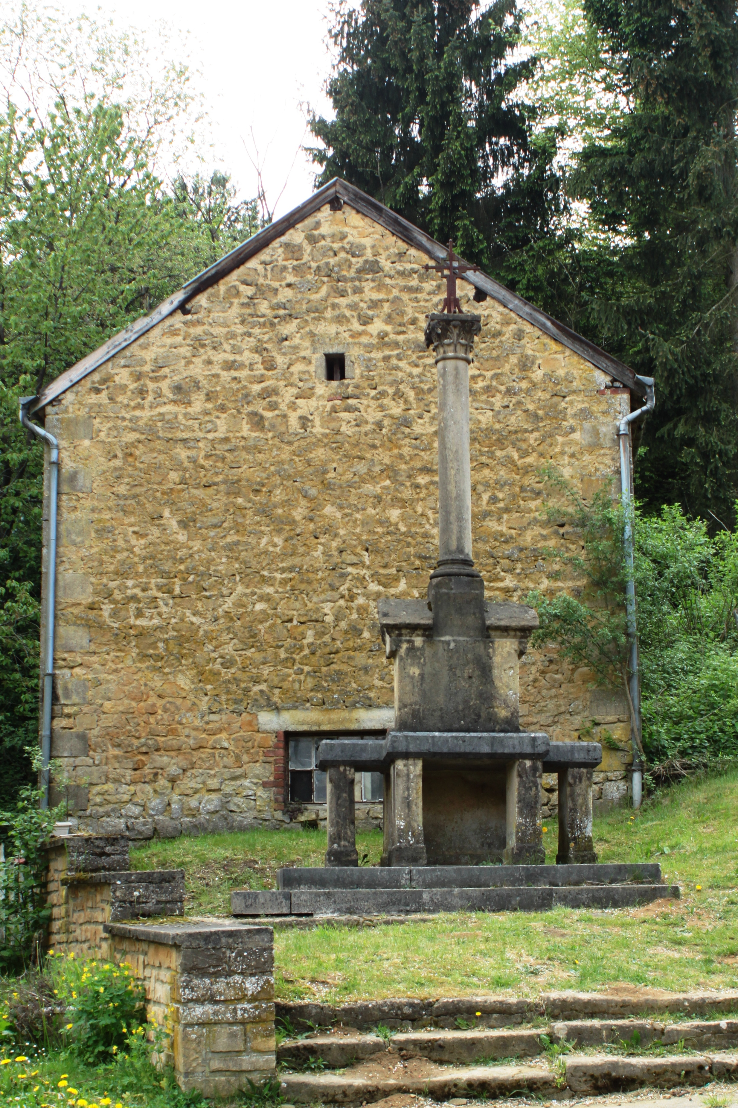 De Perron an der rue Launoy zu Meix-devant-Virton